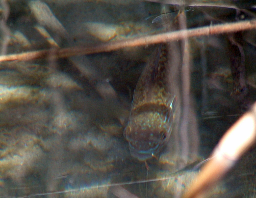 Lepomis gibbosus in Mergozzo Lake, Italy